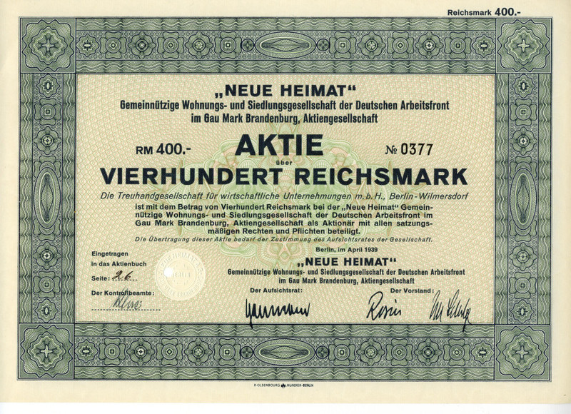 "NEUE-HEIMAT" Gemeinnützige Wohnungs- und Siedlungsgesellschaft der Deutschen Arbeitsfront im Gau Mark Brandenburg, Aktiengesellschaft, Namens-Aktie über 400RM vom April 1939